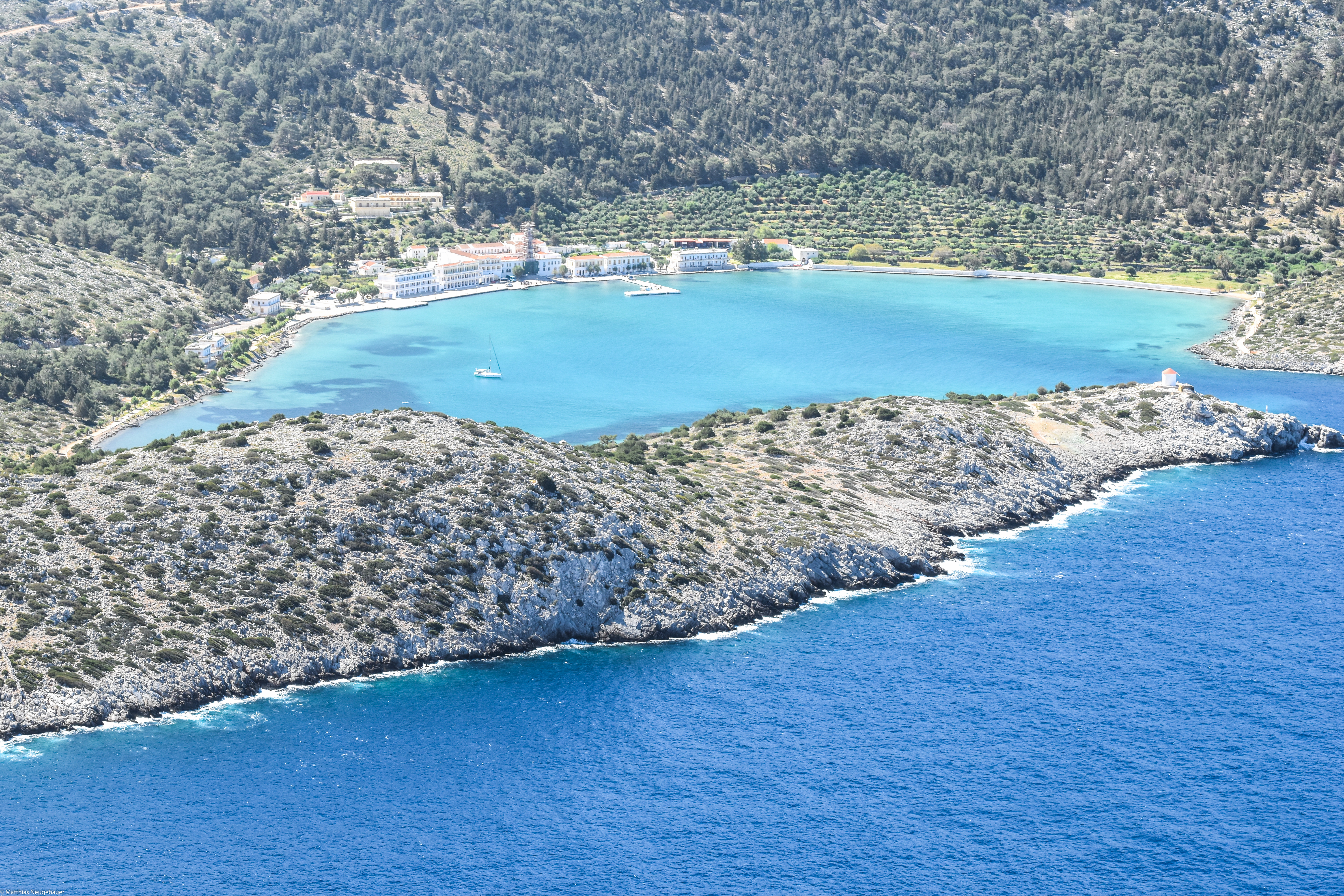 Die Bucht von Parnomitis mit dem gleichnamigen Kloster im Südwesten der Insel Symi